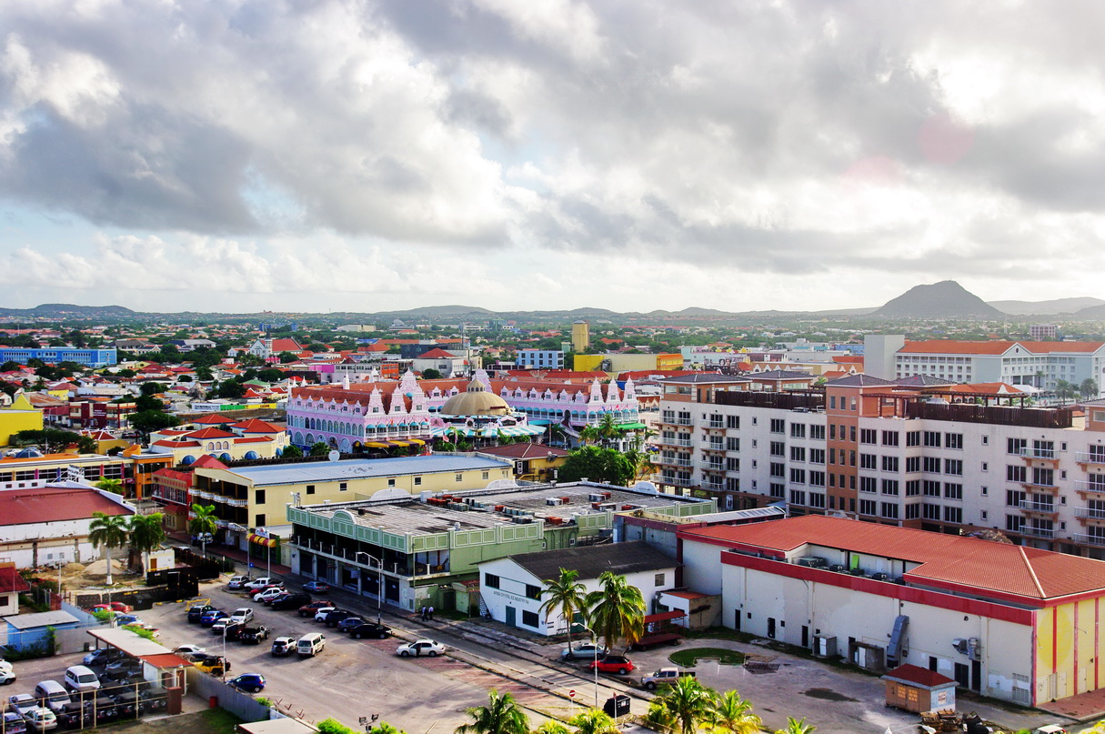 Blick über Oranjestad vom Kreuzfahrthafen